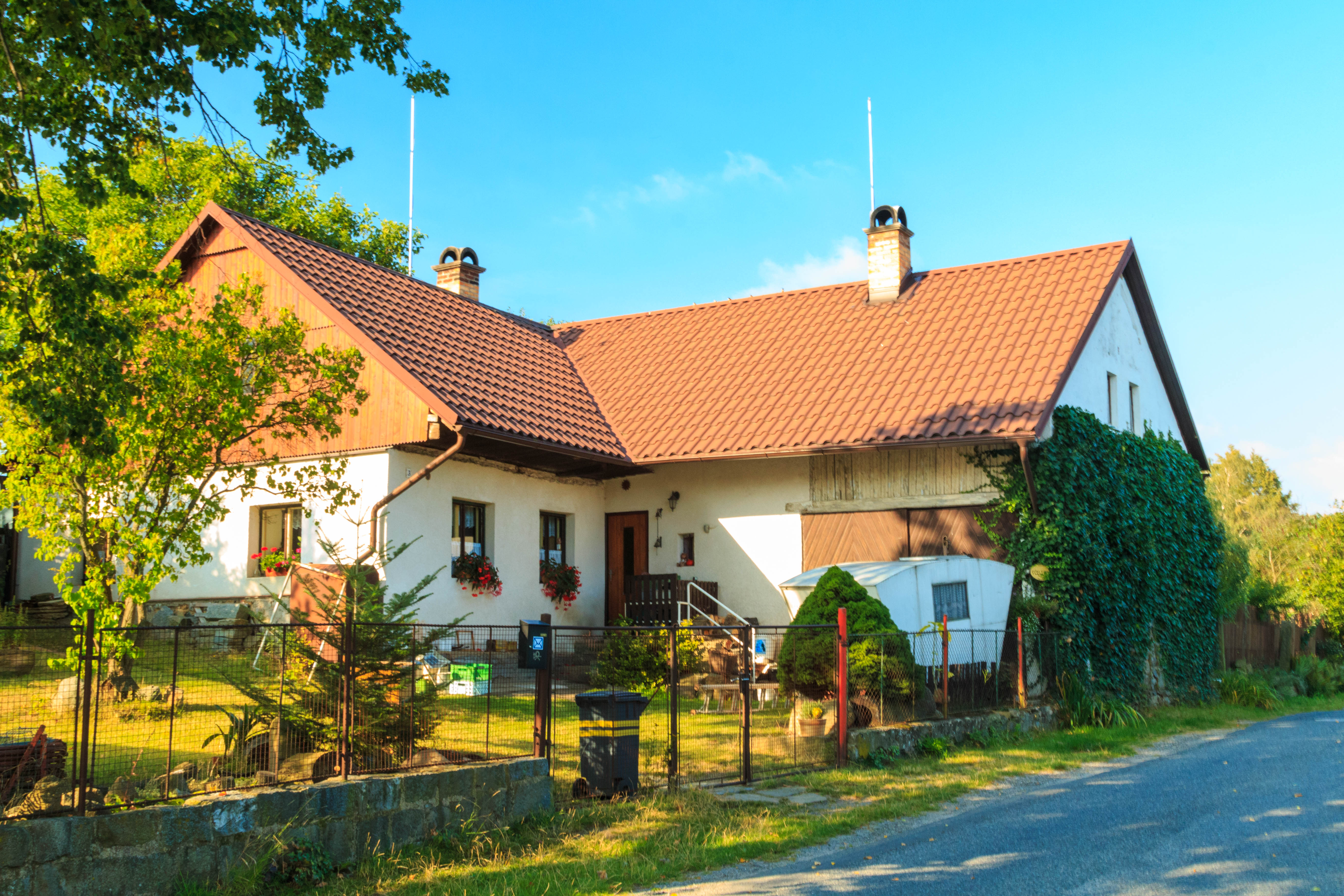 Vyhnánov - čp. 3